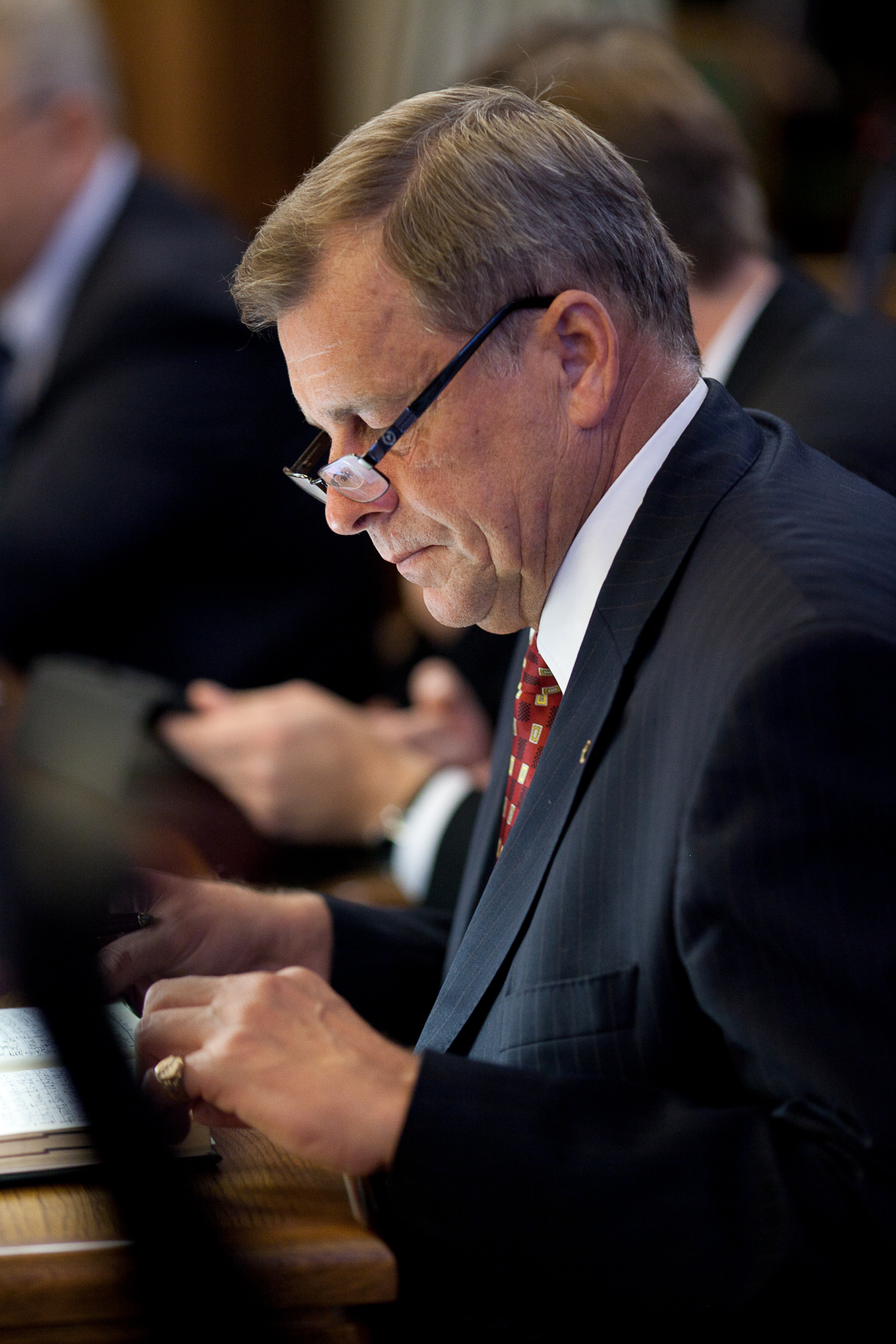 2012.gada 20.septembris. Darbs Saeimas sēdē. Foto: Ernests Dinka, Saeimas Kanceleja